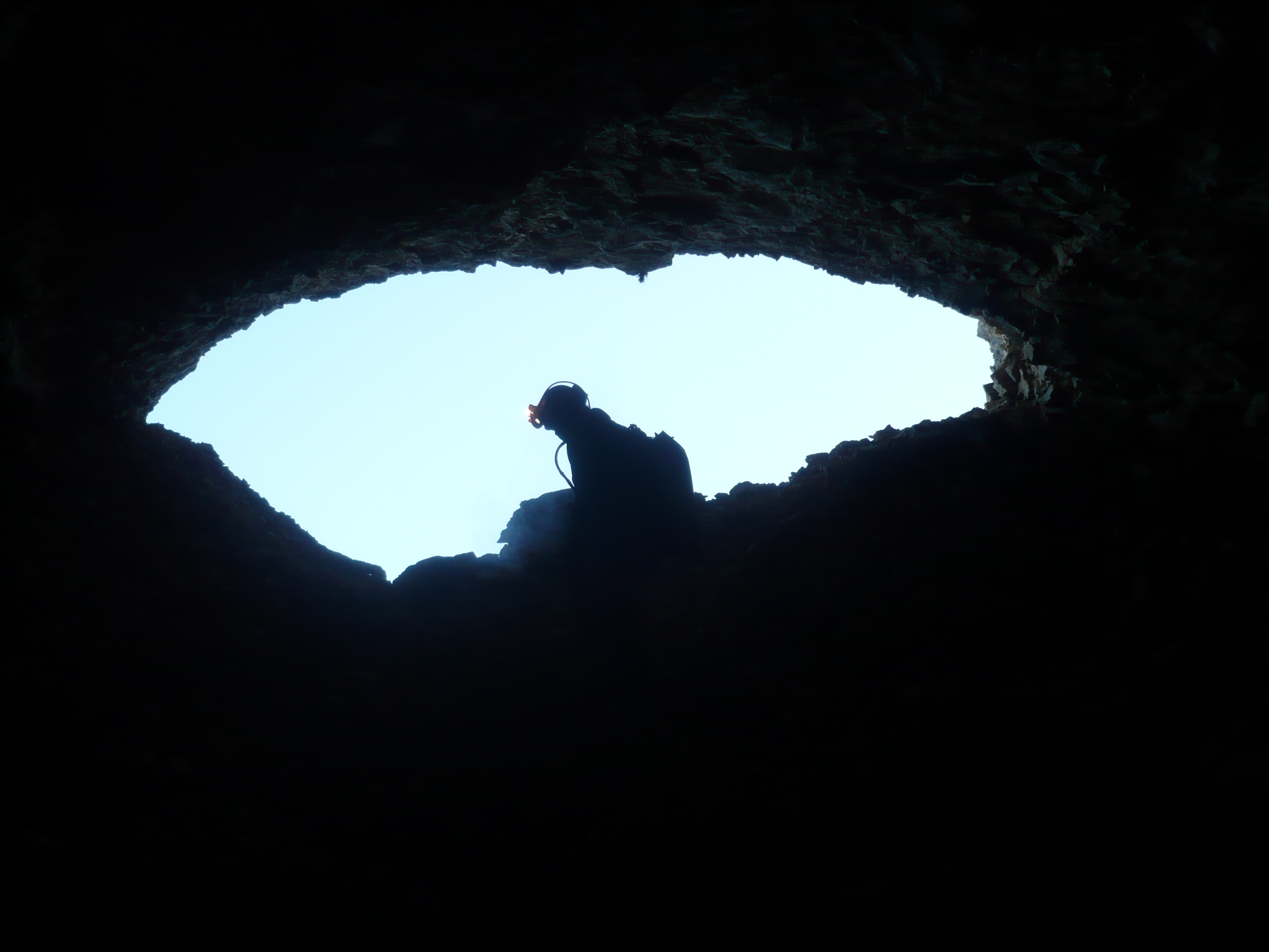 Avant de sortir au jour nous remontons l'éboulis du porche de la grotte chevalier.